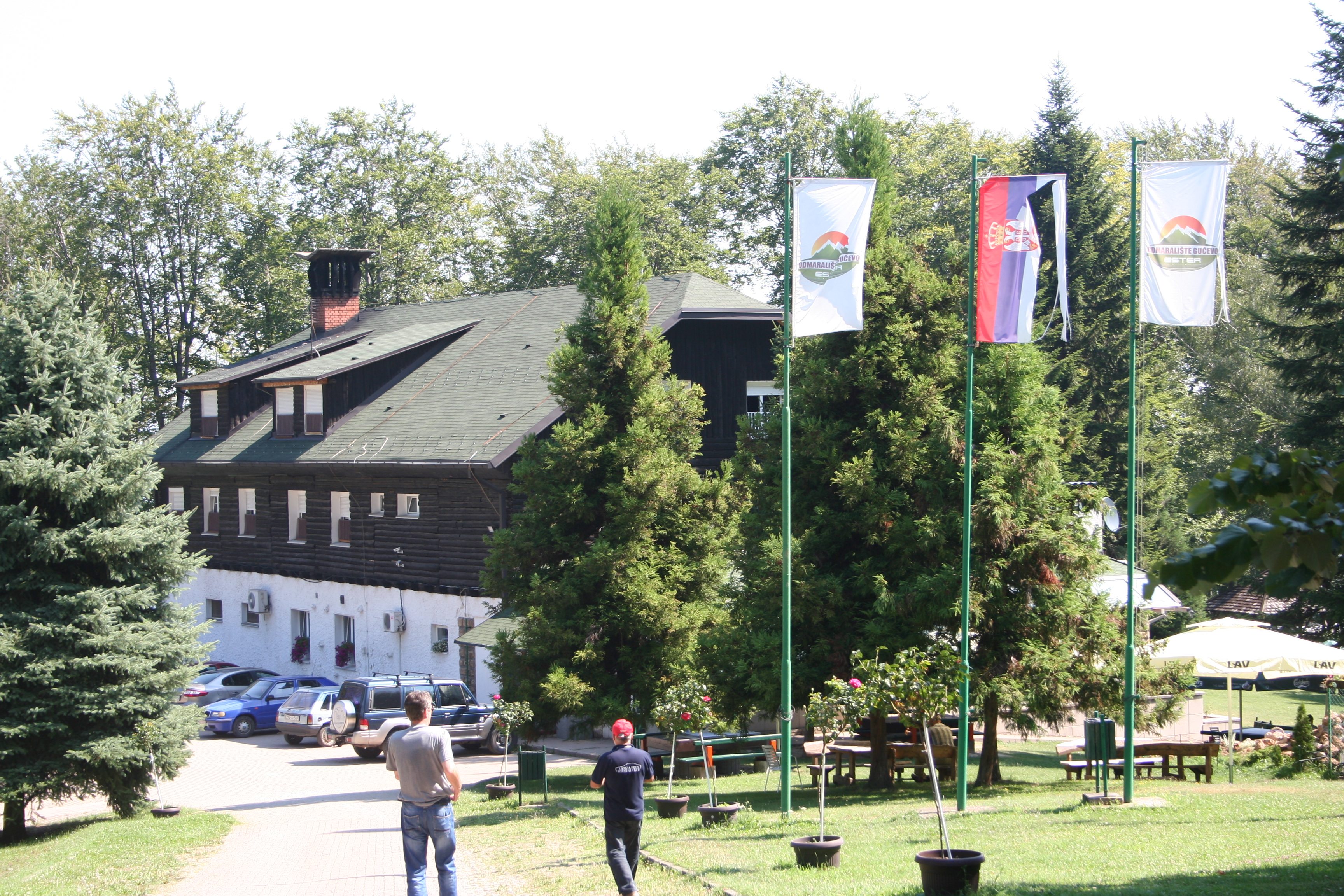 Planinarski dom i etno restoran